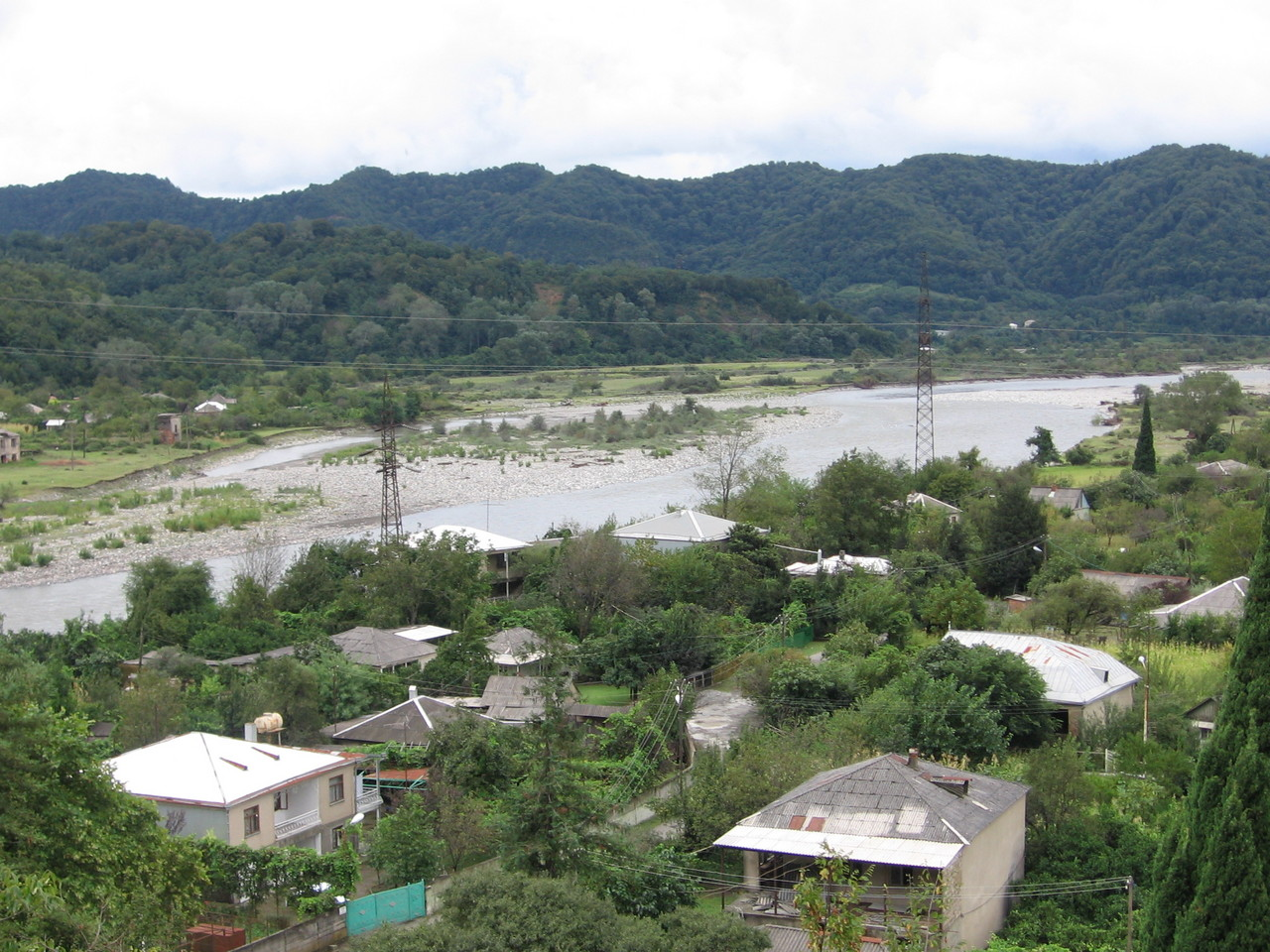 Bzyb village in Abkhazia